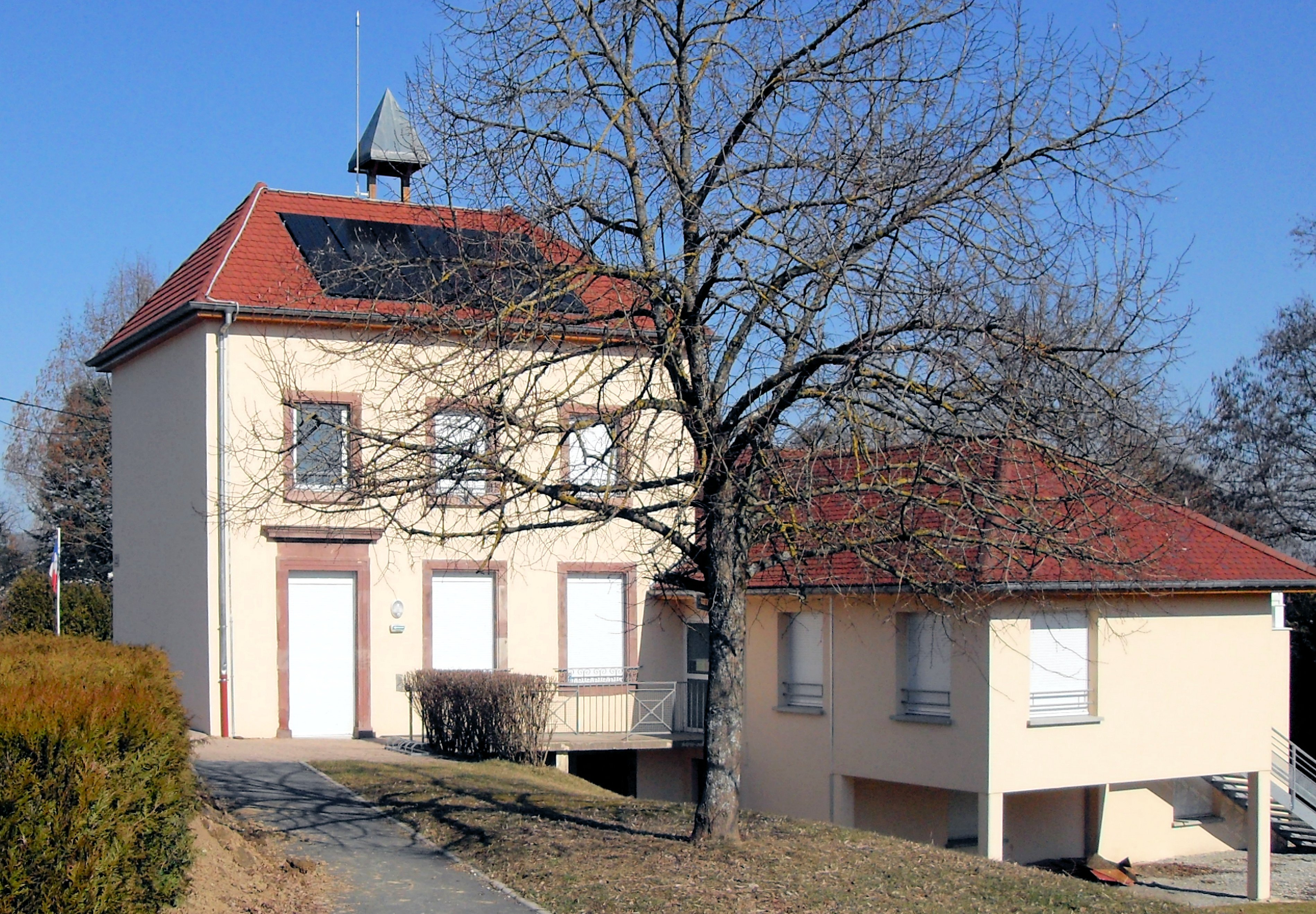 La mairie de Cunelières